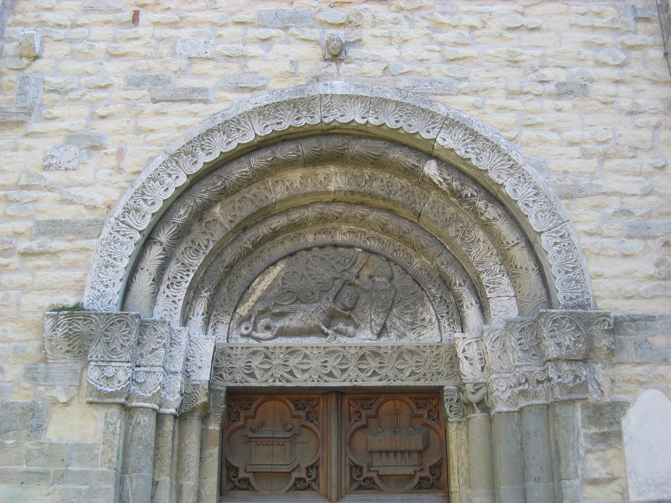 St. Peter, Straubing, West Portal.